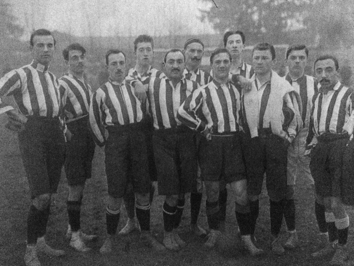 Parte della rosa della Juventus nella stagione 1907-08.